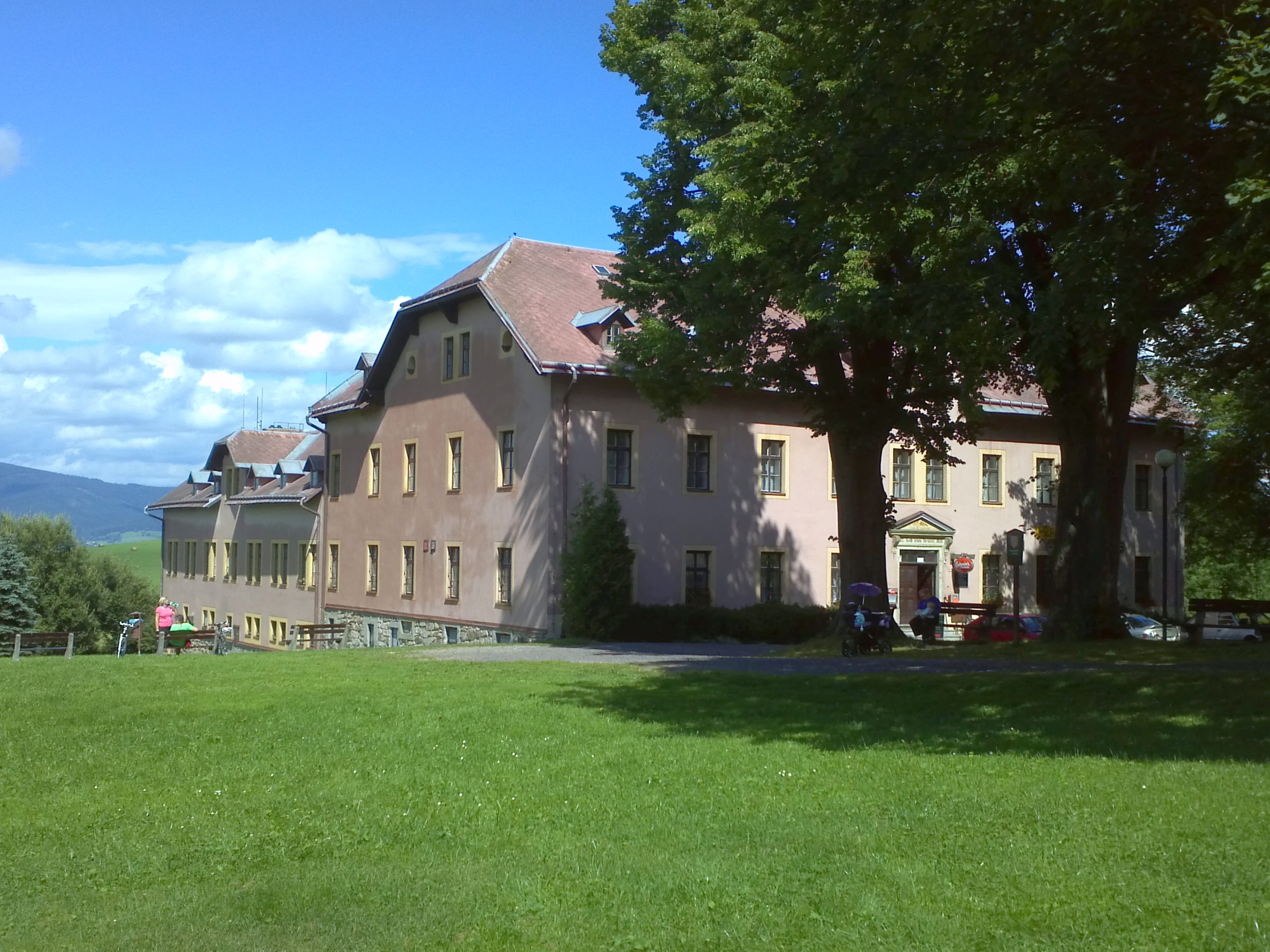 Hora Matky Boží - Poutní dům